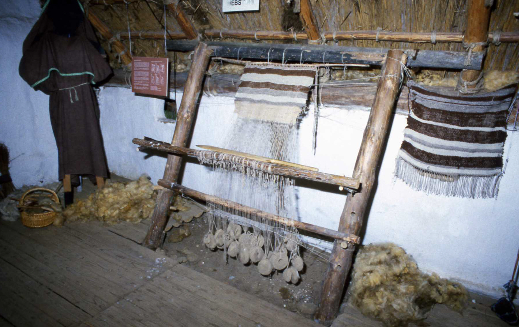 Webstuhl Nachbau aus Lejre (Dänemark)